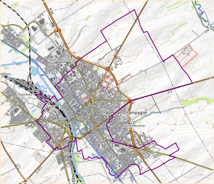 carte réalisée sur umap This map may be incomplete, and may contain errors. Don't rely solely on it for navigation.